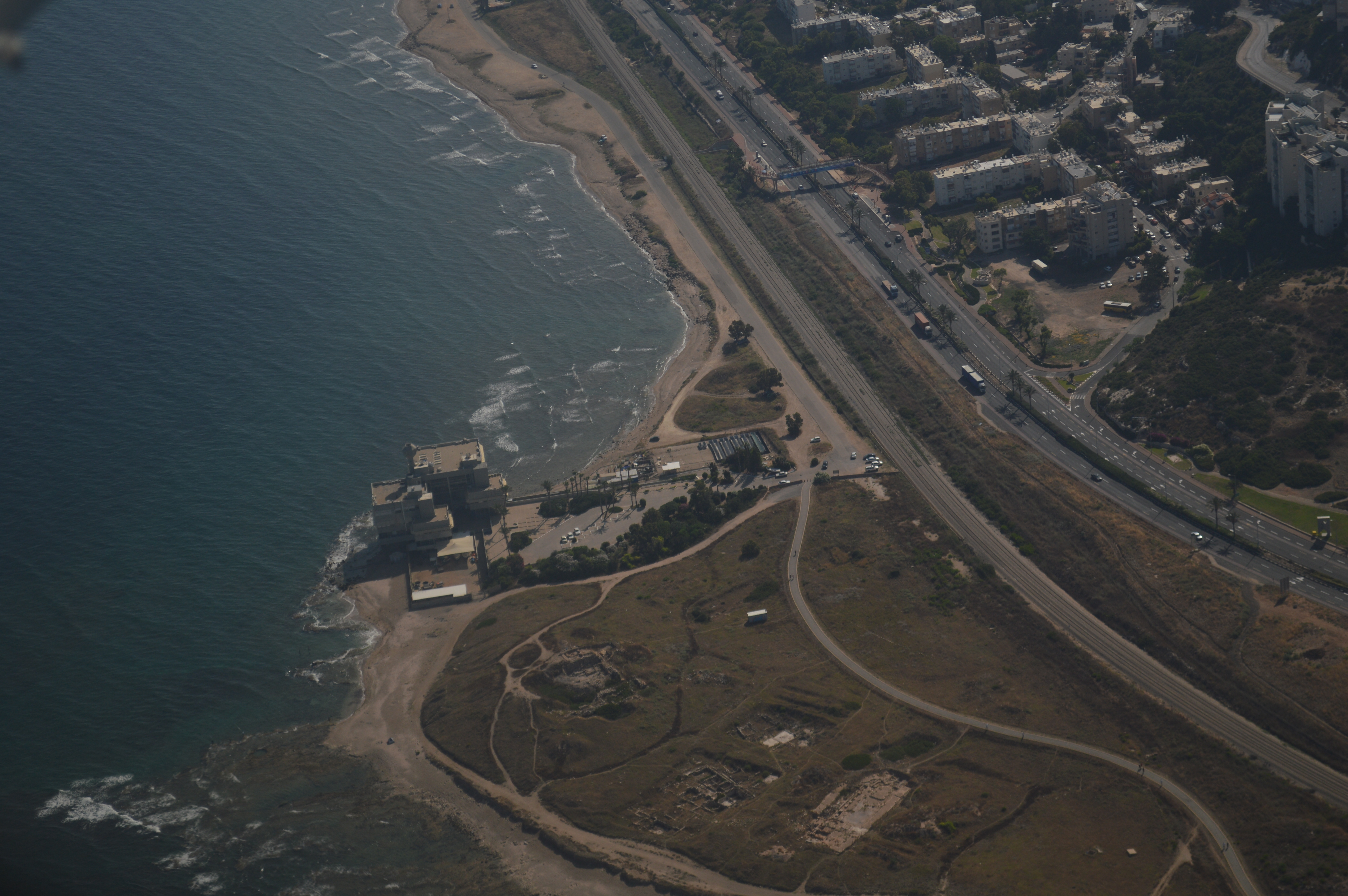 צילום אוויר של המכון לחקר ימים ואגמים ותל שקמונה